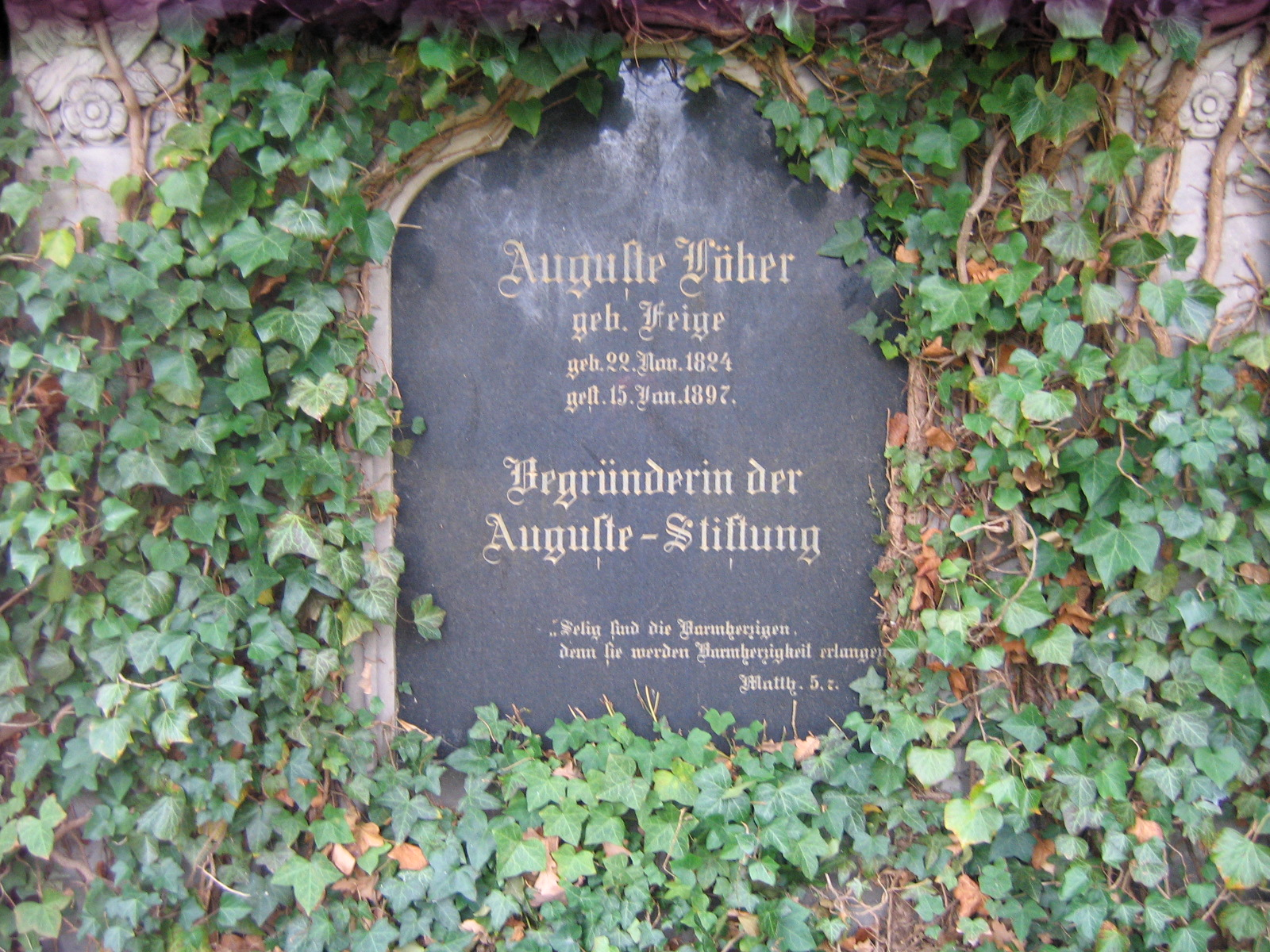 Grabmal der Begründerin der Auguste-Stiftung